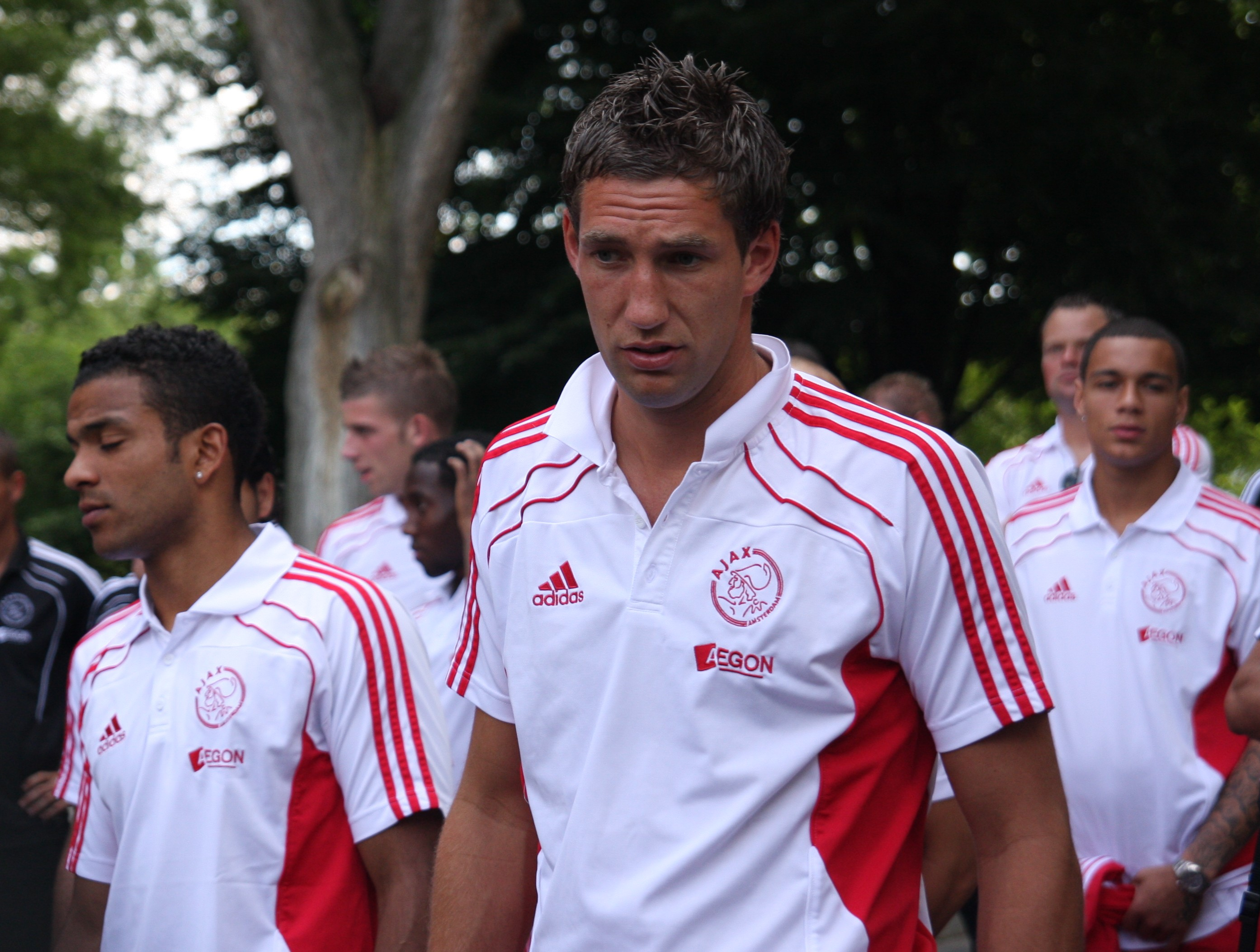 Lorenzo Ebecilio, Maarten Stekelenburg & Gregory van der Wiel.